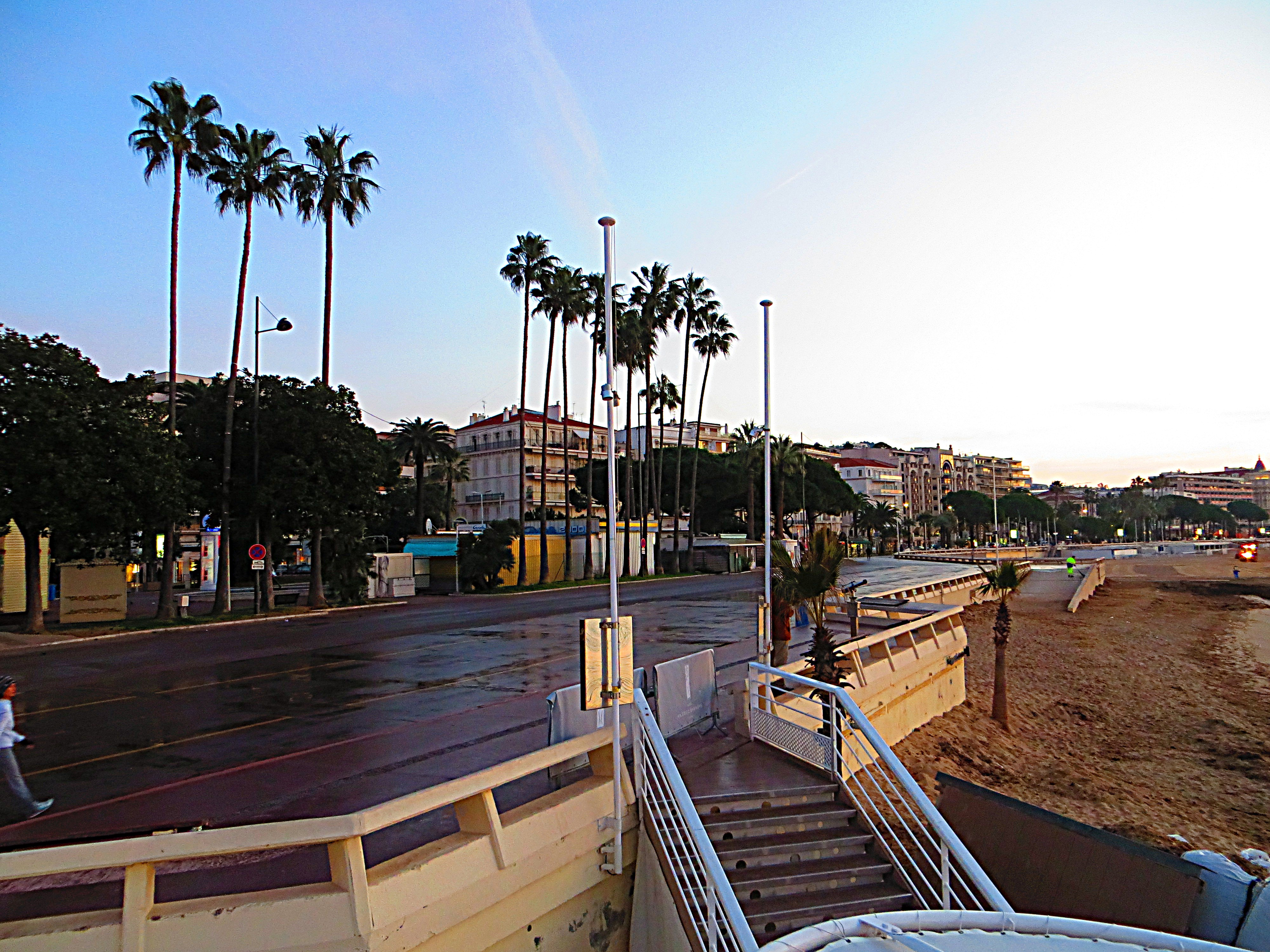 Promen. Robert Favre le Bret